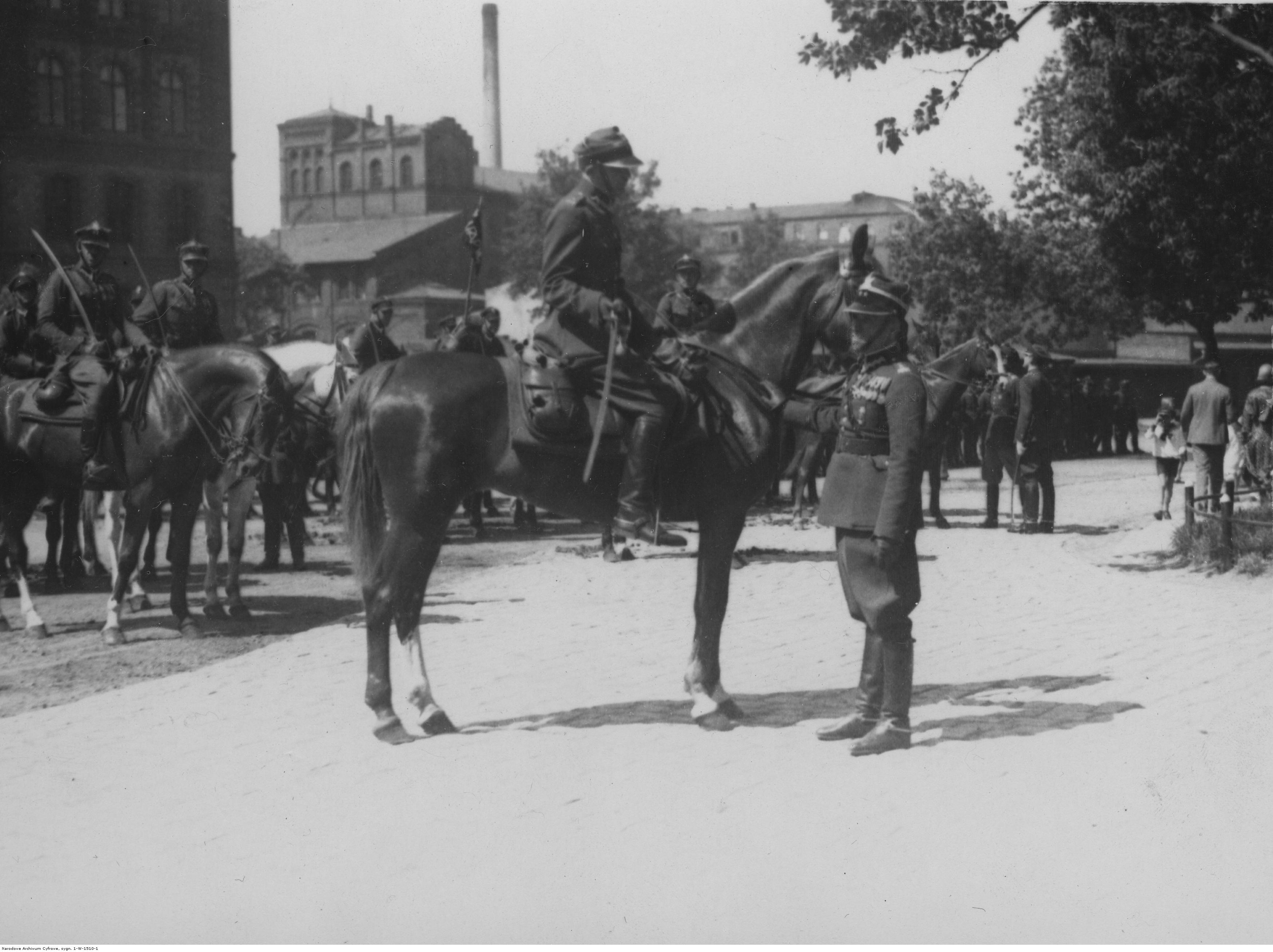 Święto 14 Pułku Artylerii Lekkiej Wielkopolskiej z Poznania; czerwiec 1931 r. Dowódca pułku płk Michał Gałązka w rozmowie z majorem Janem Szwedem (na koniu). Koncern Ilustrowany Kurier Codzienny - Archiwum Ilustracji. Sygnatura: 1-W-1510-1